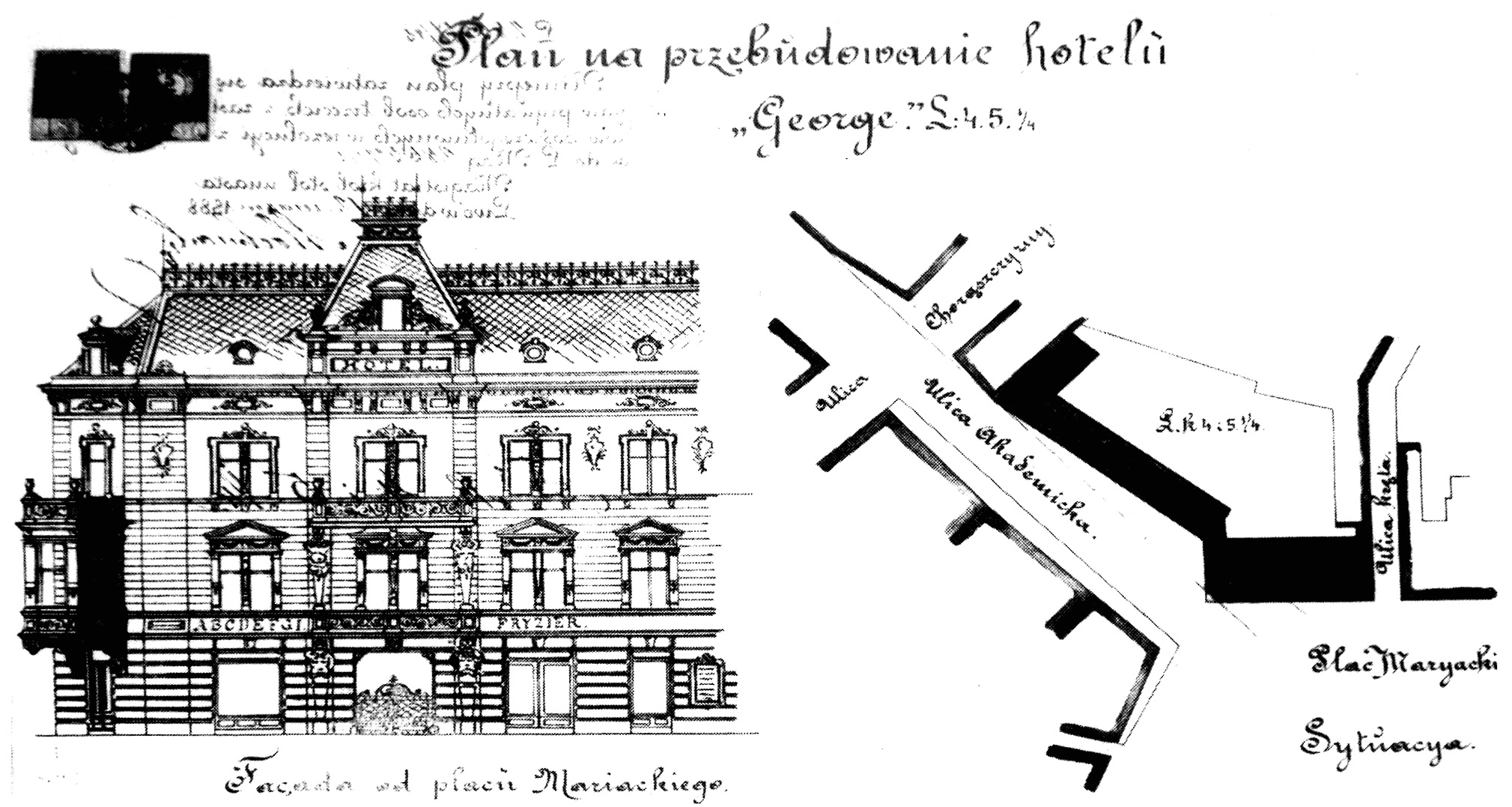 Нереалізований проект реконструкції фасаду готелю «Жорж» у Львові і ситуаційна схема (1888, арх. Альфред Каменобродський).